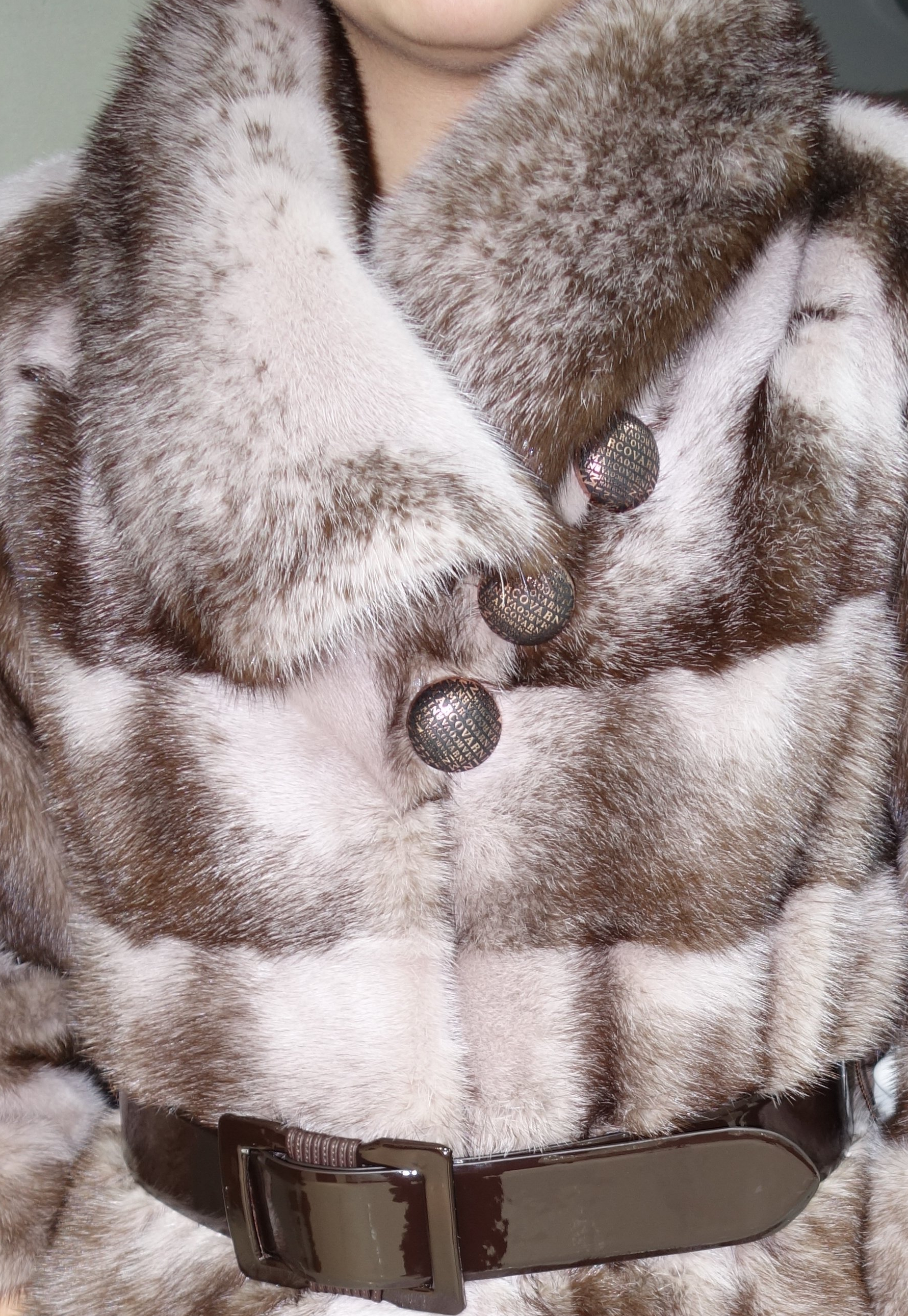 Cross Nerzmantel, quer verarbeitet, Farbe „monte“. Firma Marco Varni, Pelz-Großhändler und -Einzelhändler in der Präfektur Kastoria, Mazedonen, Griechenland mit Haupthäusern in den Orten Dispilio (Fashion Center mit Showrooms) und Dispilio (Werkstätten).